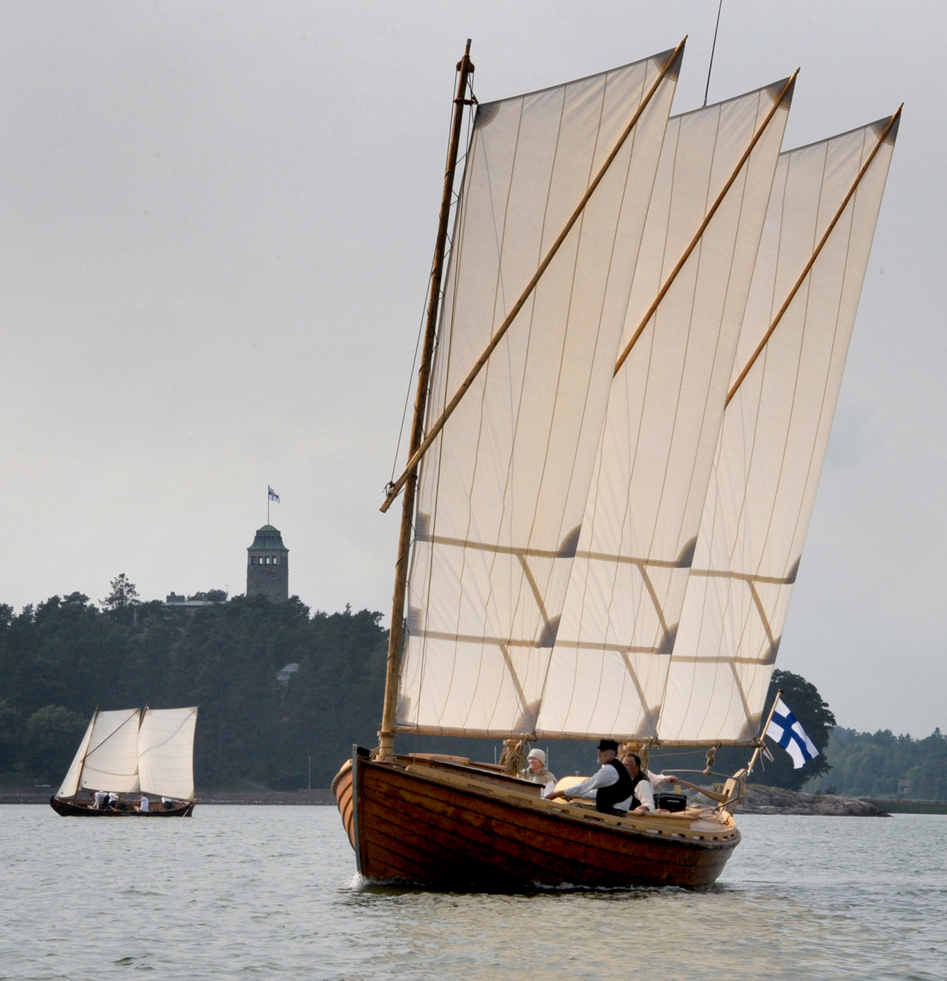 Santtioseura ry